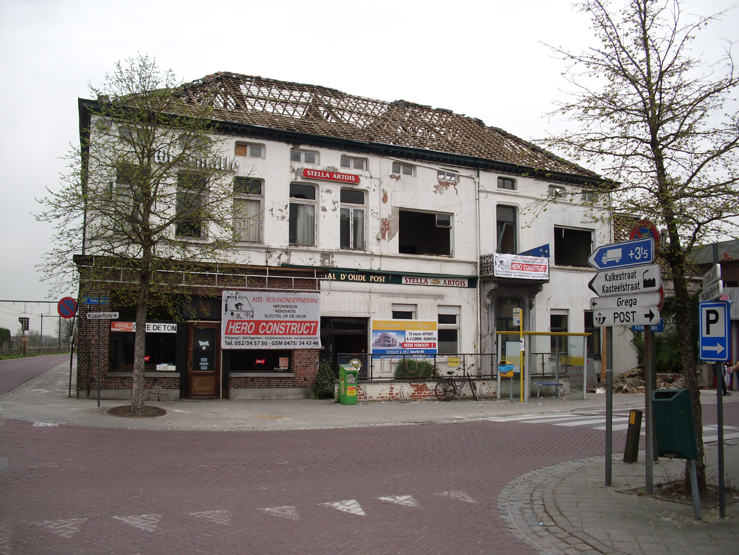 De Ton en Oude Post voor de afbraak - Buggenhout - Oost-Vlaanderen - Vlaanderen - België. Geschiedenis: Kerkstraat nr. 87-89-91. Voormalige brouwerswoning van de brouwerij Van Damme, ingeplant op de hoek met de Spoorwegstraat en de spoorwegovergang. Volgens het kadasterarchief werd een vrijstaande woning met koetshuis opgericht in 1878 door Julien Van Damme-Kiekens, in 1880 uitgebreid aan de linker kant en oprichting van de brouwerijgebouwen rechts, achter het koetshuis. In 1883 wordt de eigendom in twee gesplitst; het rechter deel met brouwerij wordt verkocht aan brouwer Joseph Van Damme-Meert die de brouwerij verder vergroot. Tussen 1903 en 1922 wordt in het linker gedeelte het “Gesticht Tanghe” of “Kostschool voor jongens A. Tanghe-Van Damme” opgericht met volgens het kadasterarchief eerst een uitbreiding van het woonhuis in 1906 en de aanbouw van een schoolvleugel in 1908. Van 1922 tot 1927 bleef de instelling als “Kostschool voor jongens C. Ghijsselinckx” nog bestaan. Tot 1938 wordt de brouwerij verder gezet door Celestin Van Damme, daarna wordt het een bierdepot en limonadefabriek. Circa 1930 werd het linker deel van het gebouw vooraan uitgebouwd en ingericht als café “De ton”. Het midden gedeelte werd postkantoor, thans “Feestzaal d’oude post”. In 2010 werd dit gebouw afgebroken, in de plaats komt een nieuwbouw met 19 appartementen en vier winkels.